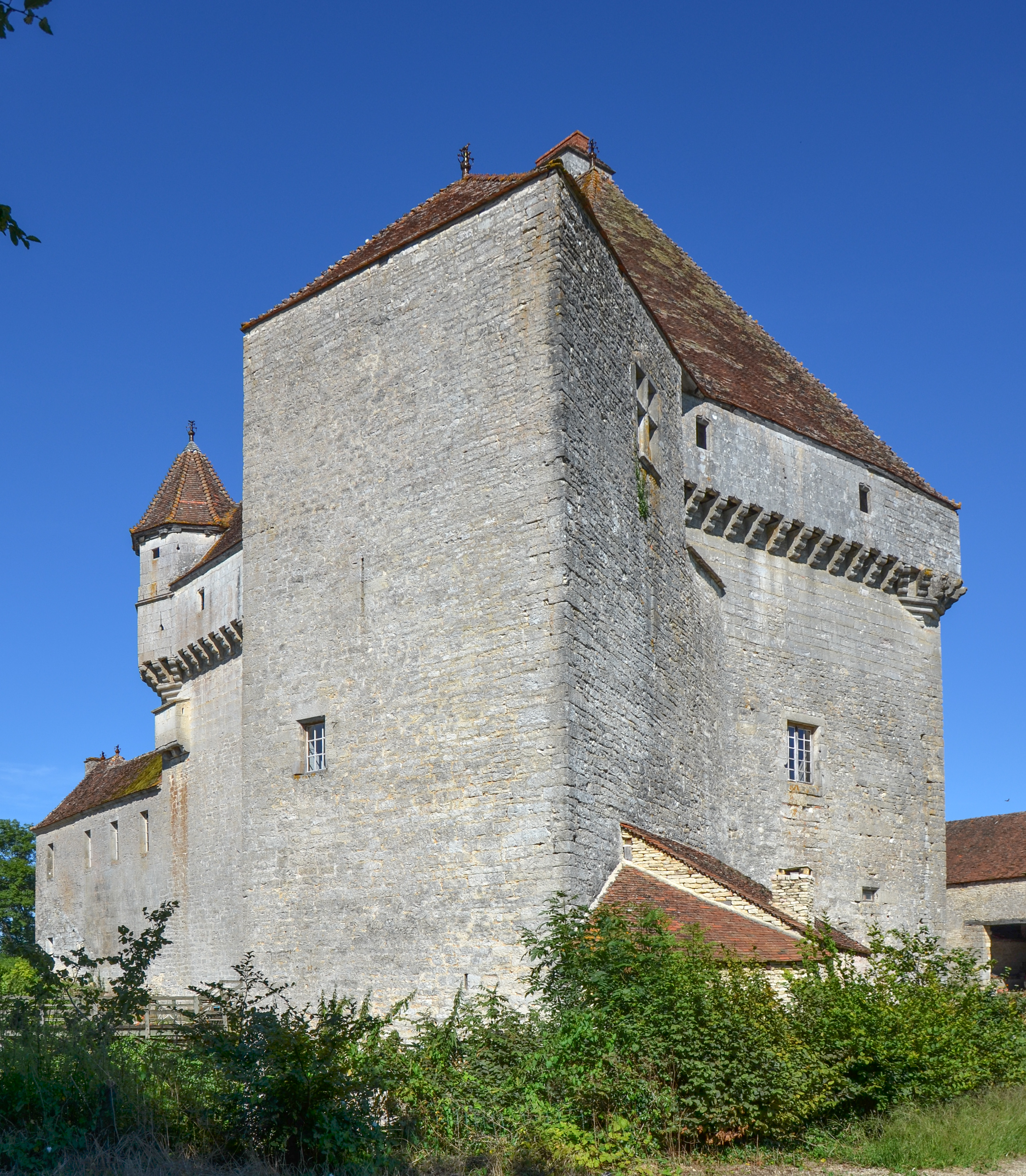 Château de Rosières à Saint-Seine-sur-Vingeanne, Côte d'Or, Bourgogne, France